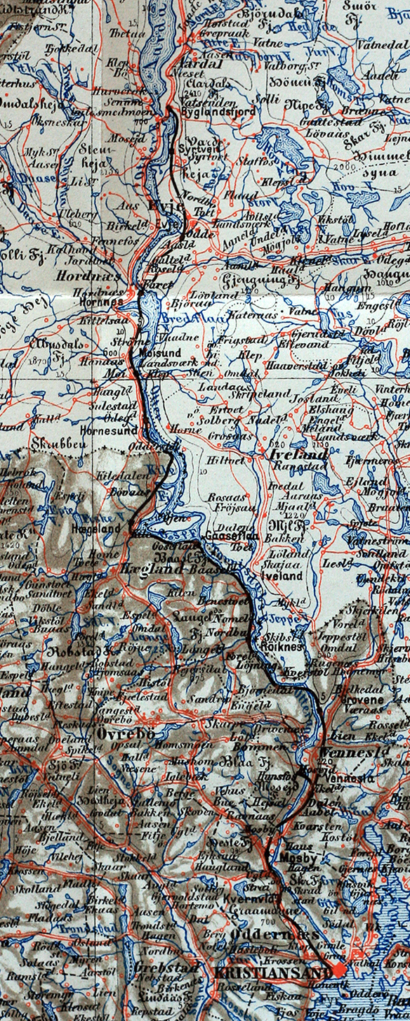 Kart over Setesdalsbanen.